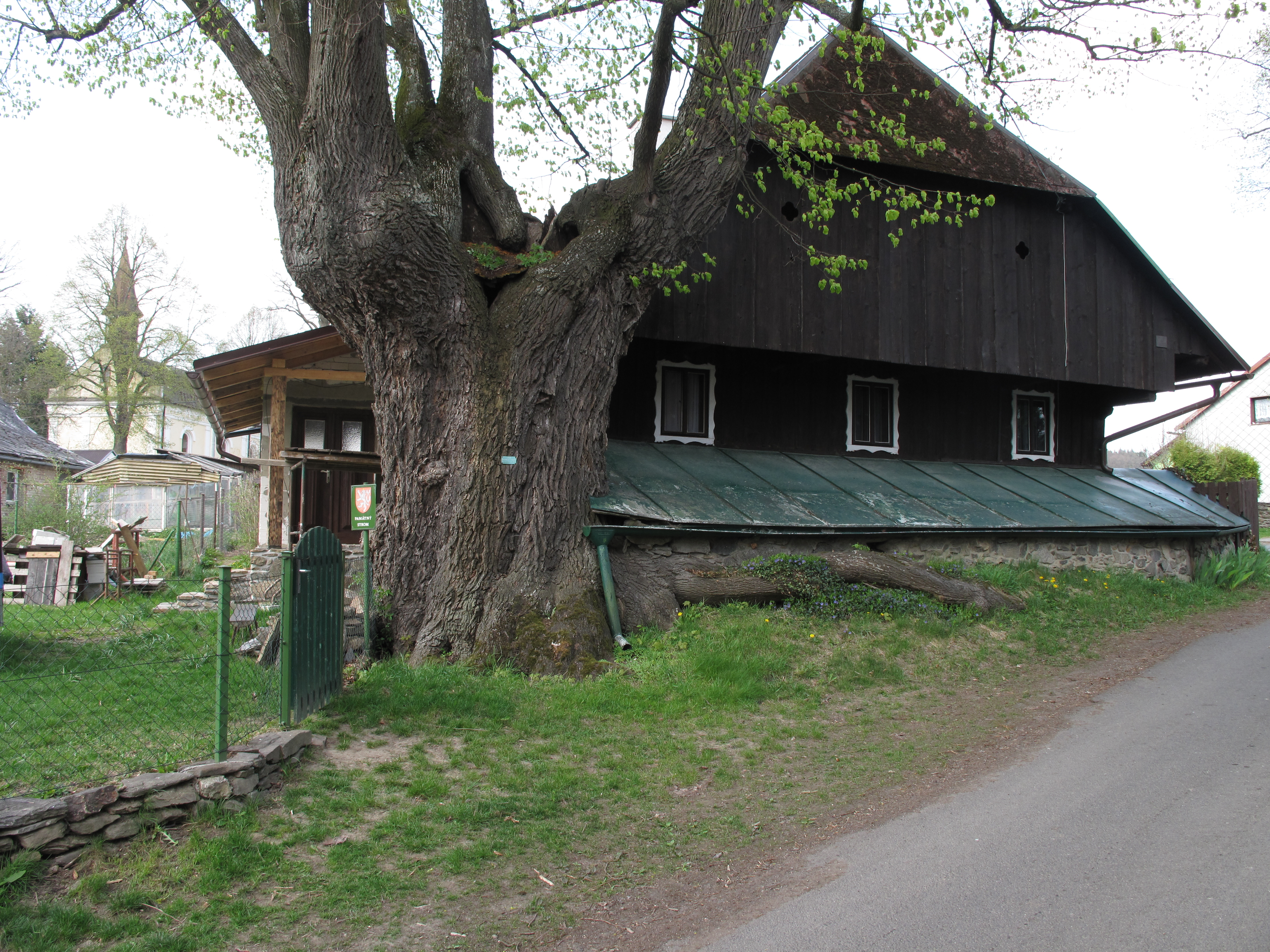 Památný strom Hadravská lípa - lípa velkolistá (Tilia platyphyllos). Okres Klatovy, Česká republika.